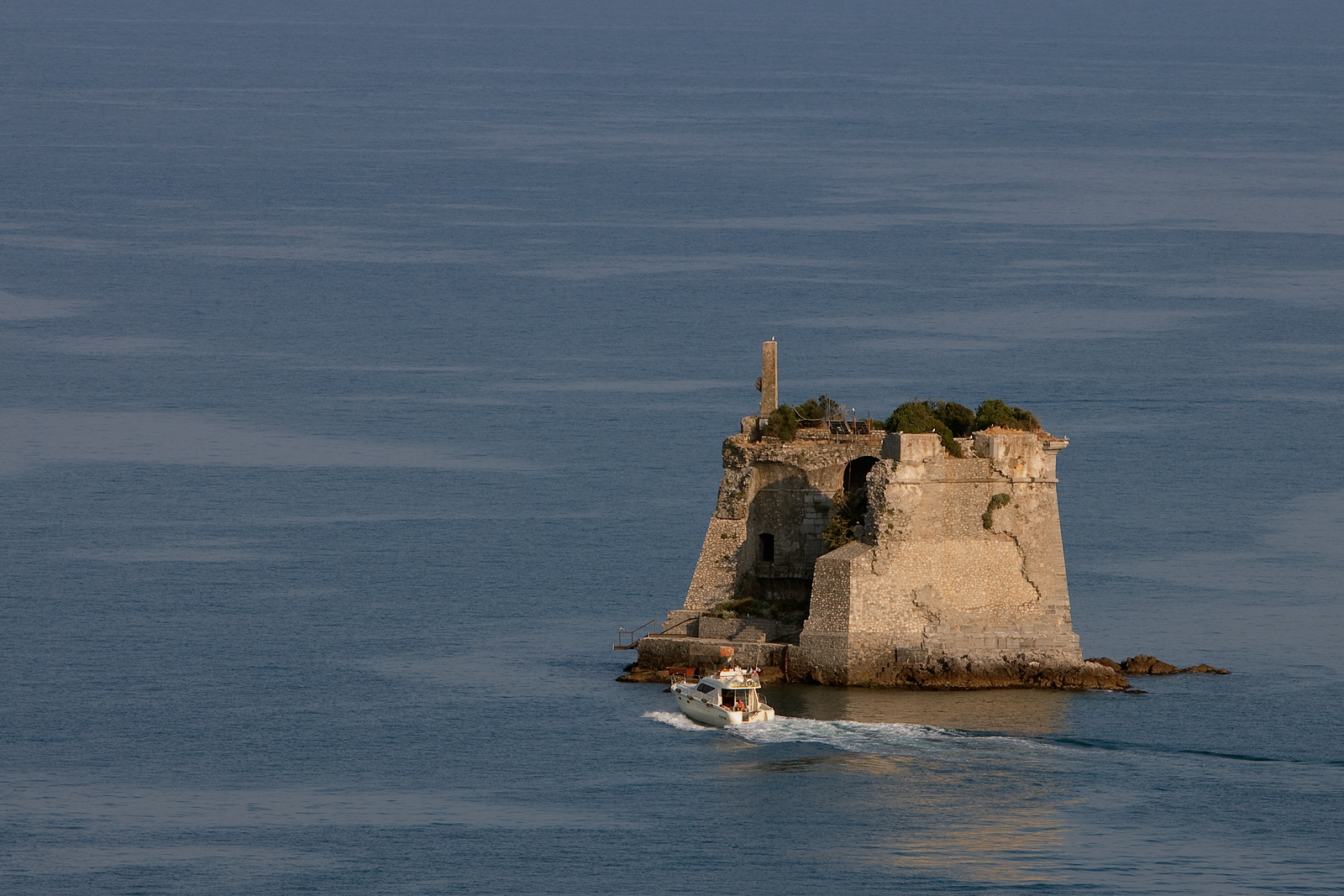 La torre Scola presso l'isola della Palmaria, Porto Venere, Liguria, Italy